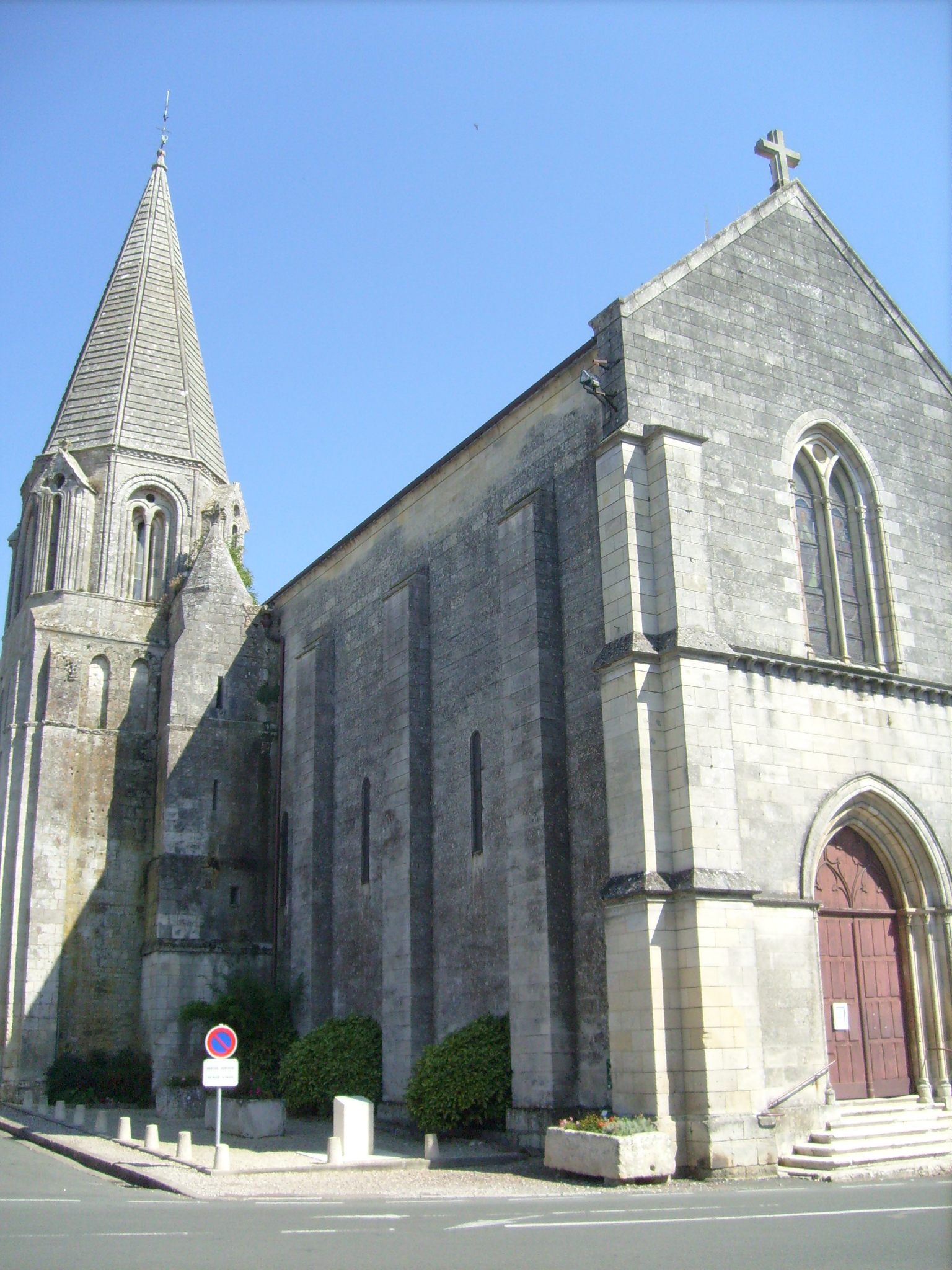 Facade de l'église de Gémozac